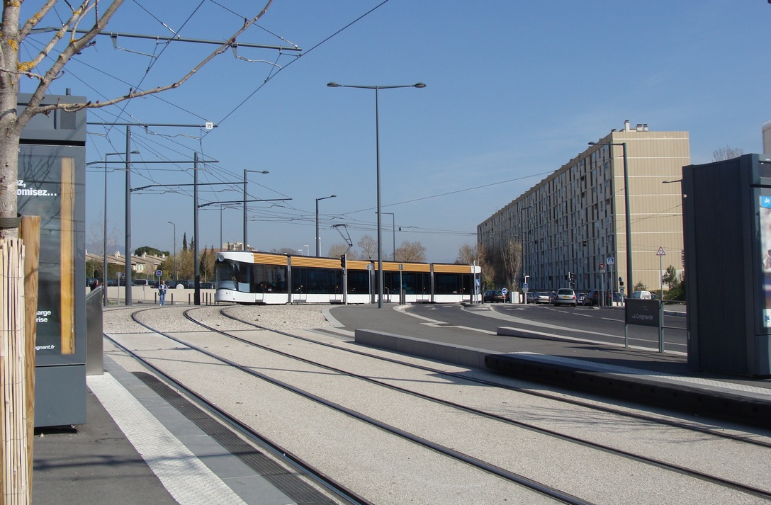 Le nouveau tramway de Marseille au carrefour de la Grognarde (12e arrondissement)